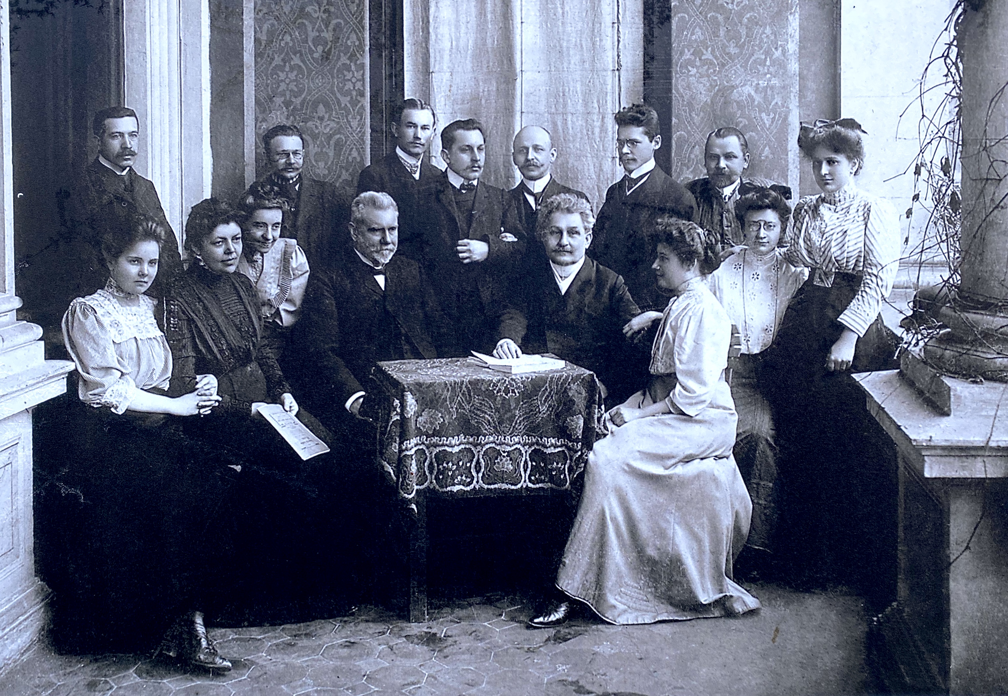 Leóš Janáček - Cercle rus